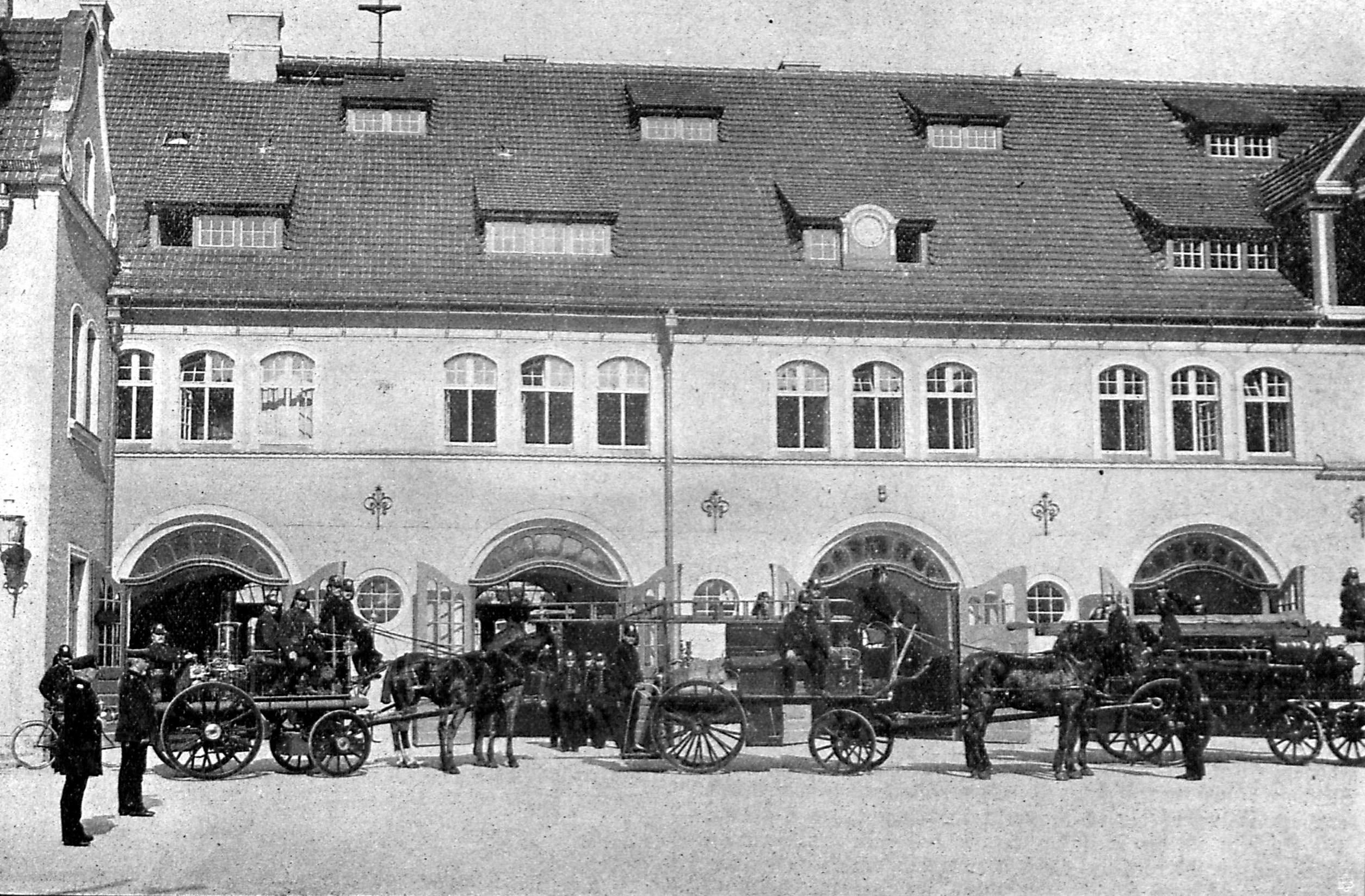 Branddirektor Baurat Deditius, Brandmeister Muuss, Hofansicht mit alarmierten Feuerlöschzug.